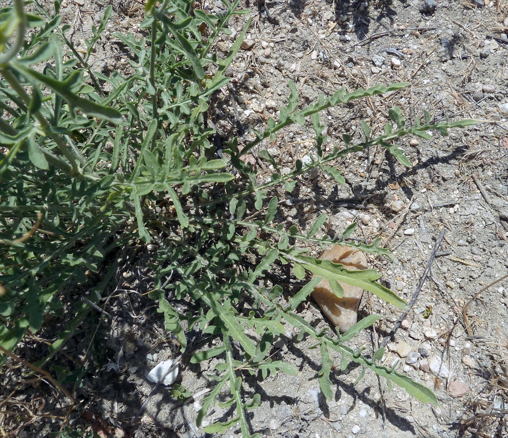 Centaurea ornata - Hojas basales - Circa Estación de Contenedores de RENFE/ADIF de Abroñigal/Embajadores, Madrid (España).